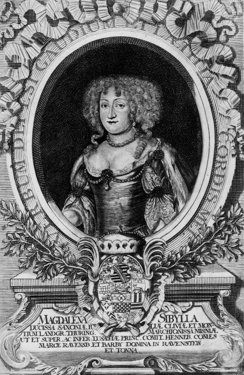 Magdalena Sibylla von Sachsen-Weißenfels (1648–1681), Herzogin von Sachsen-Gotha-Altenburg